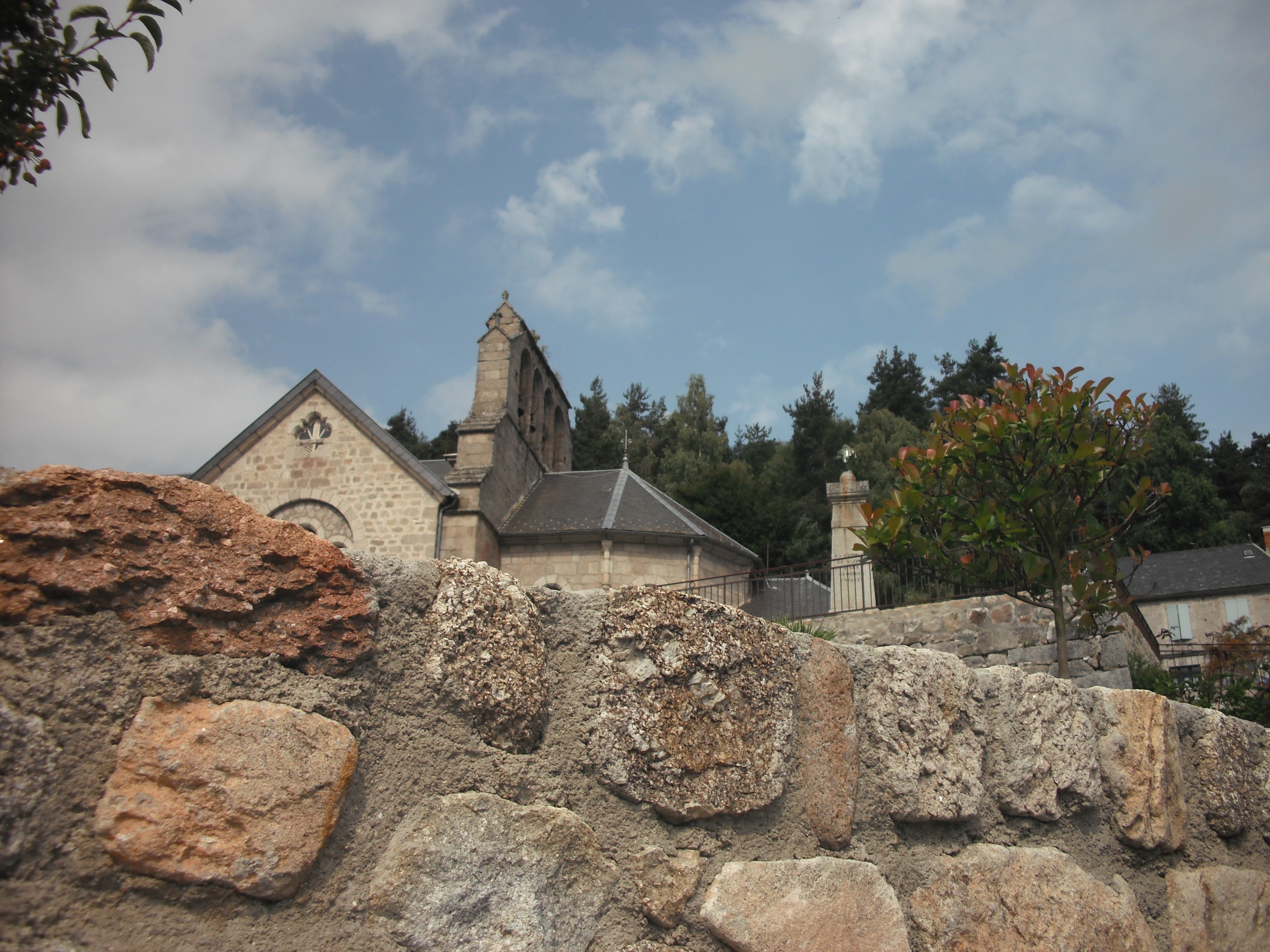 Église de Saint-Just (Cantal, Auvergne, France).